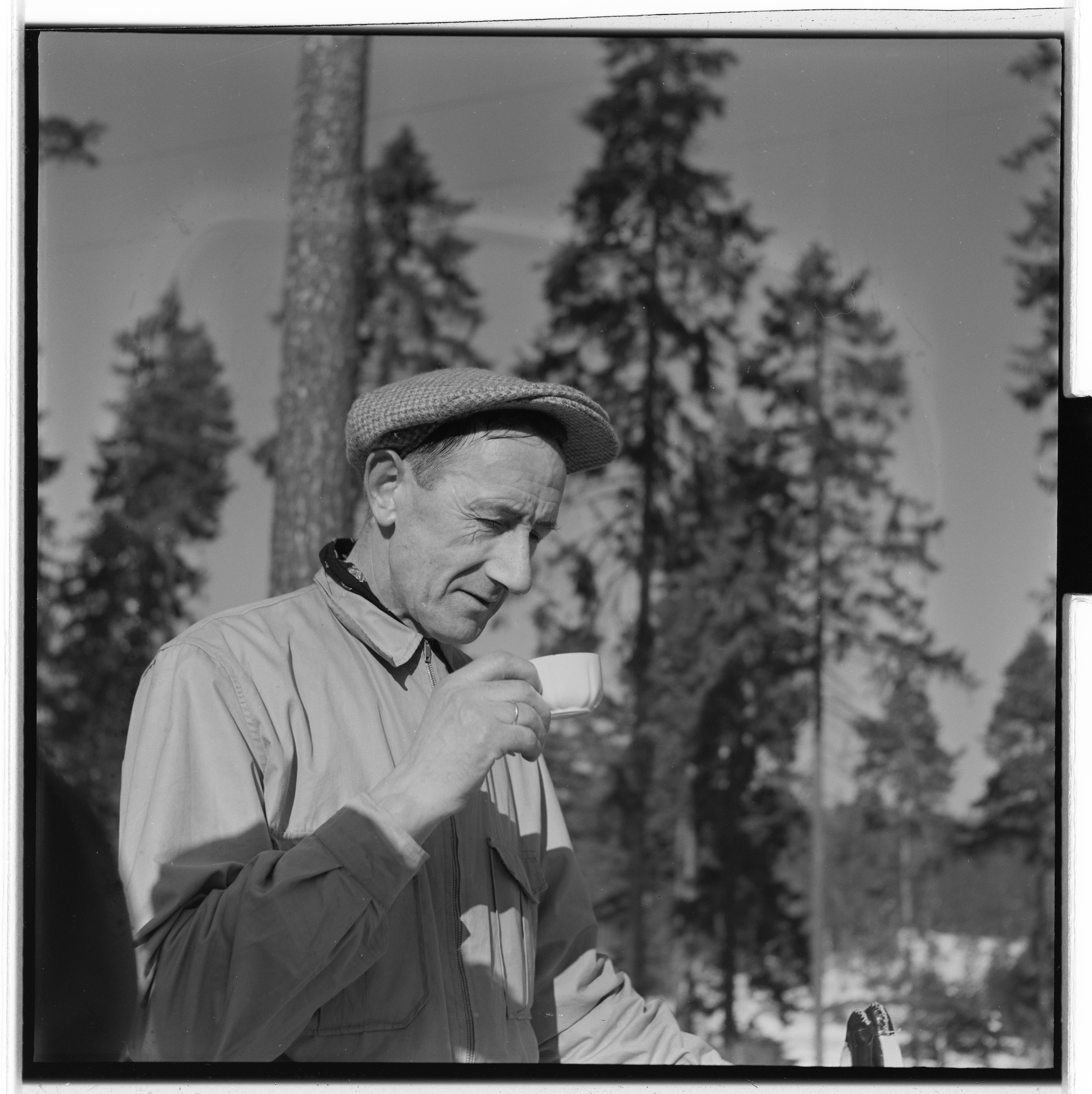 Bildet er hentet fra Arkivverket. Stortinget på ski NÅ nr. 9, 1955 Arkivinstitusjon : Riksarkivet Arkivnavn : Billedbladet NÅ Sted : Norge, Ukjent, Ukjent, Ukjent Emneord: Ski, Menn, Vinter, Snø Avbildet: Hans Berg